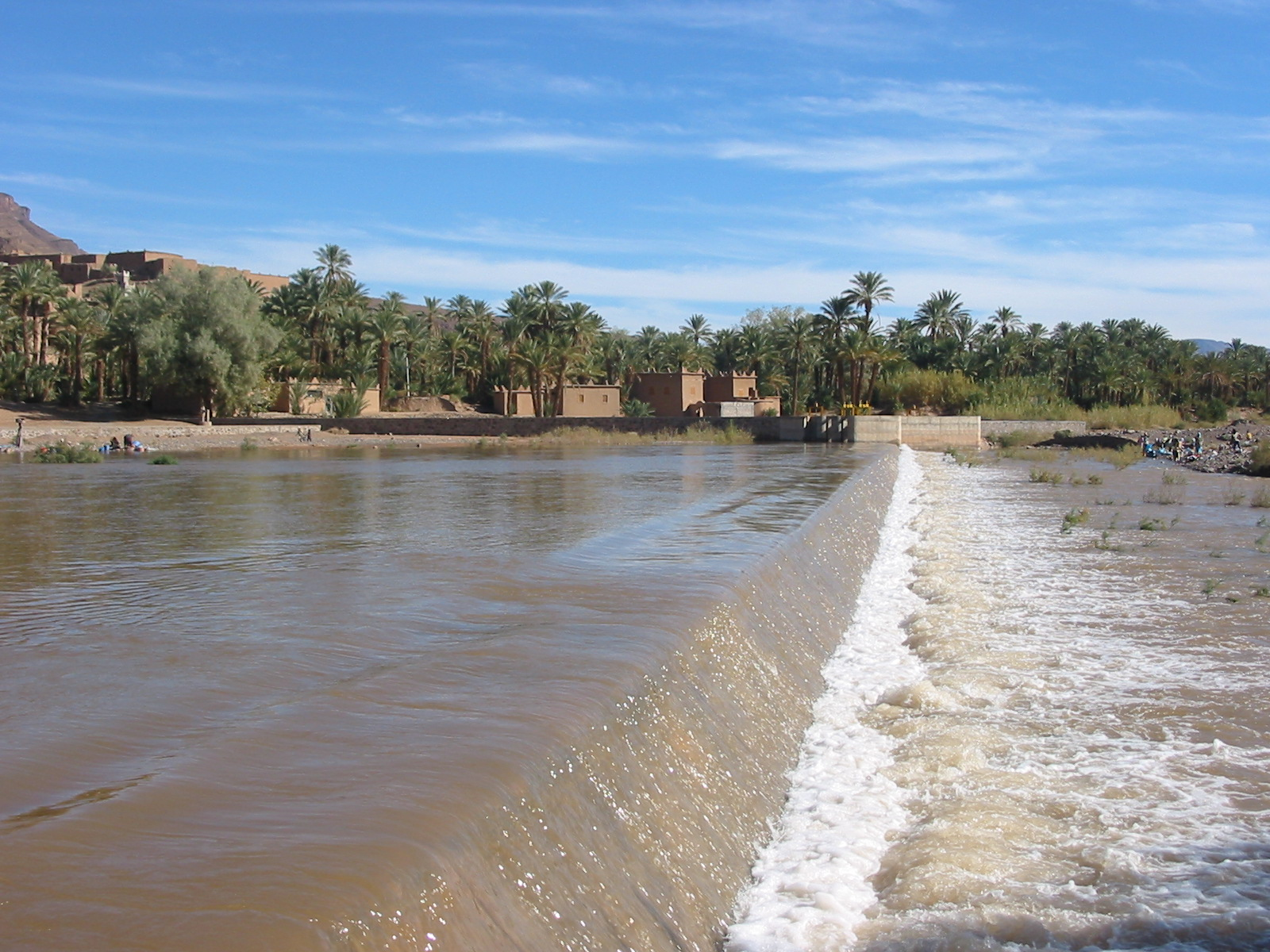 Draâ river in Agdz